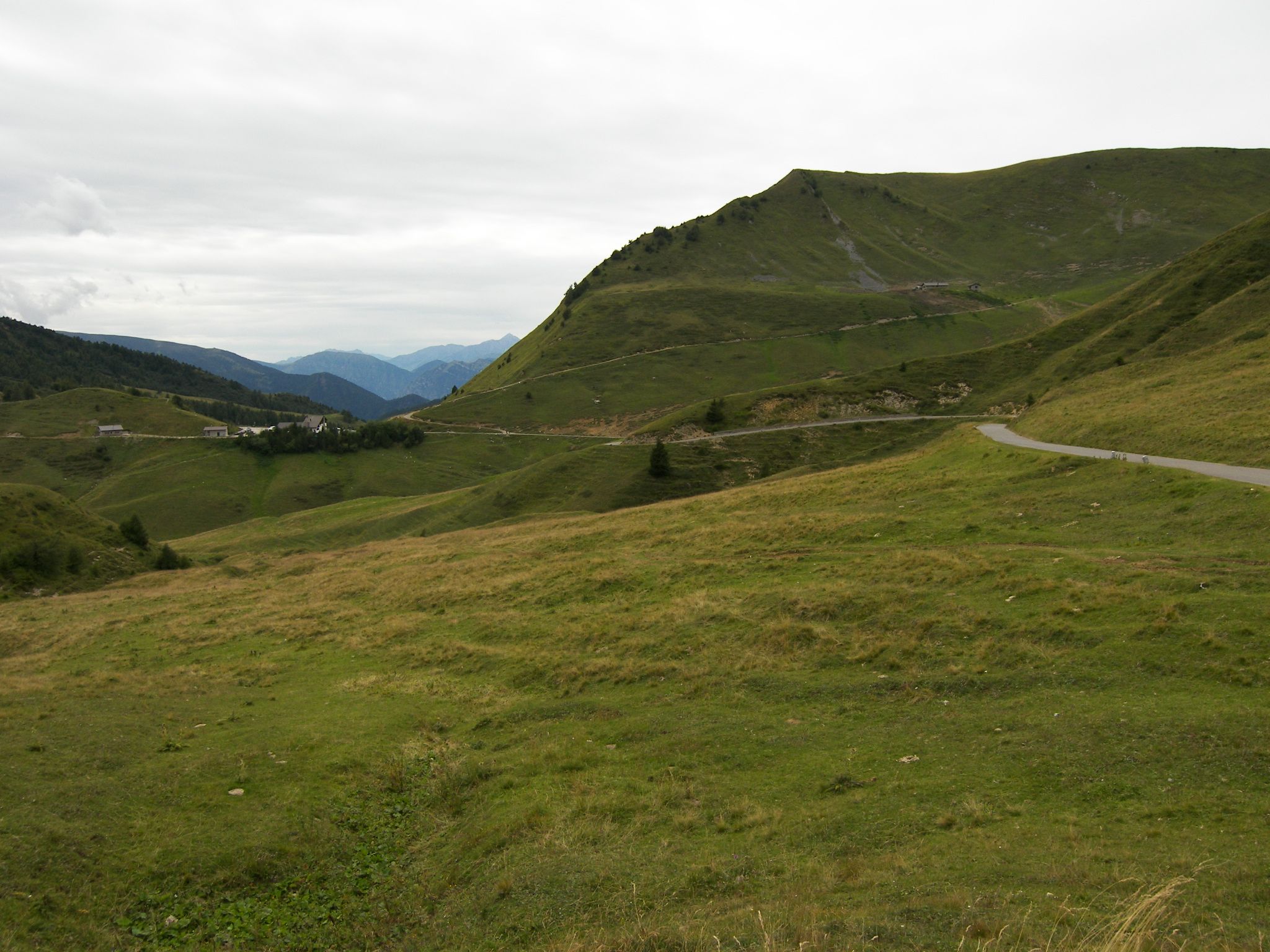 Passtraße des Croce Domini